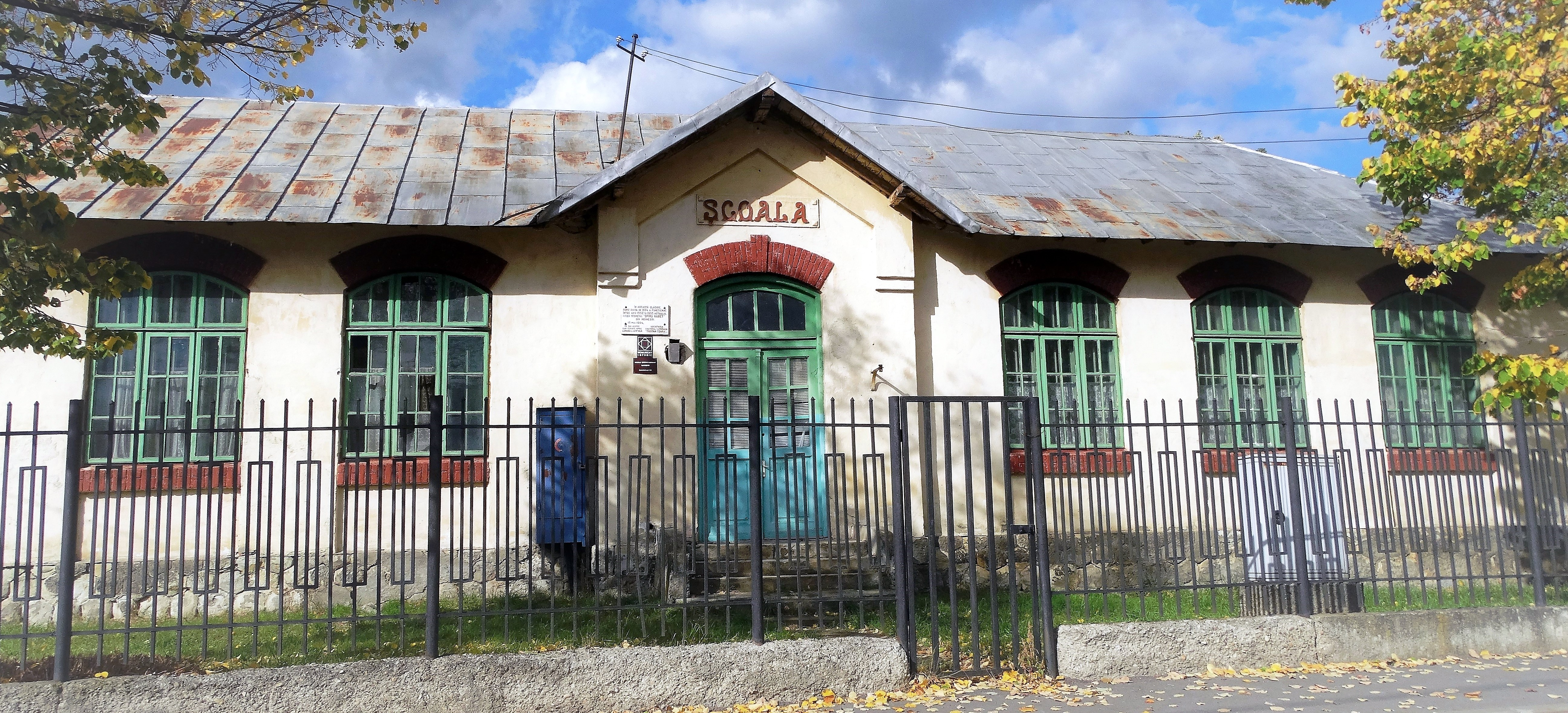 Fosta Școală primară de băieți, azi Atelierul Școlii „Ștefan Luchian”